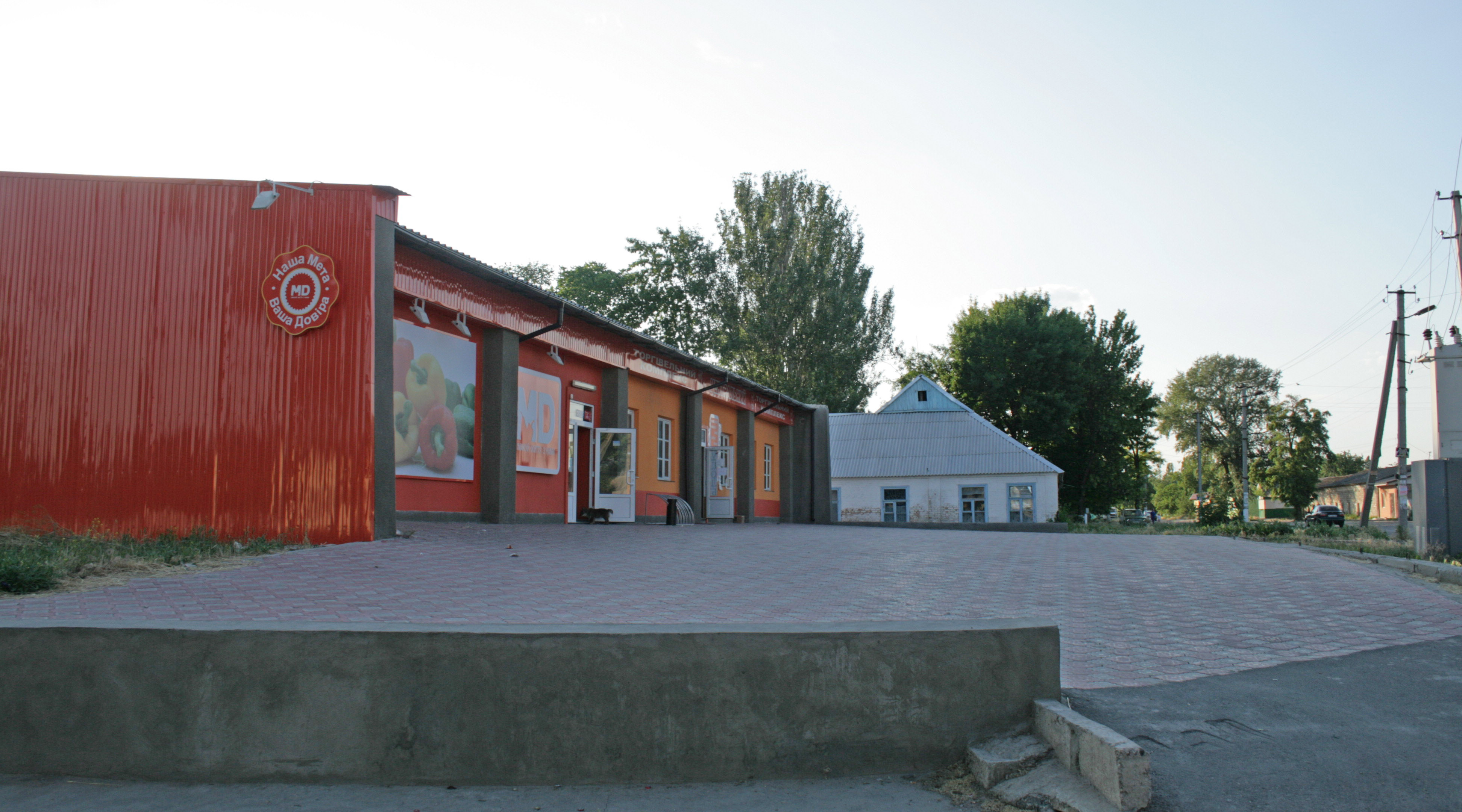 Магазин сети «МД Ритейл» в Кушугуме